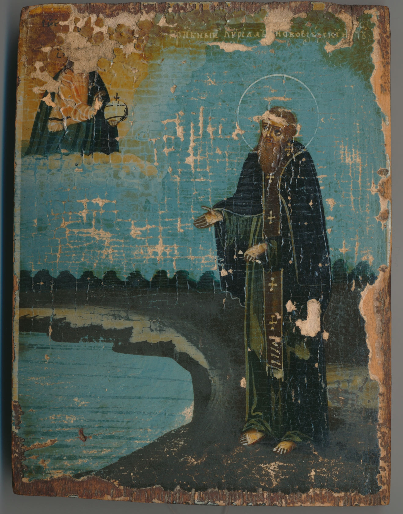 Скан семейной иконы прп. Кирилла Новоезерского XIX века, 105 х 140 мм